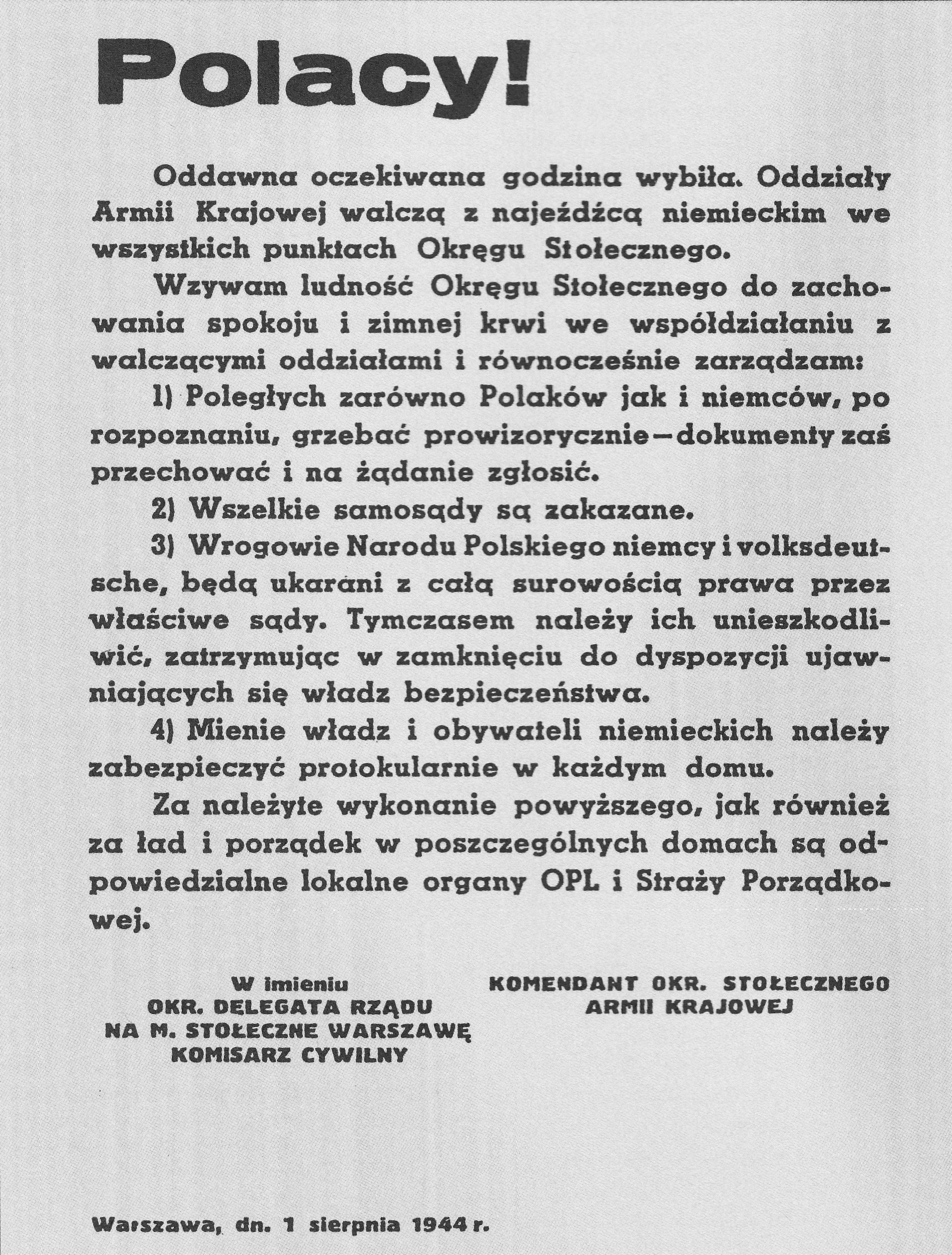 Odezwa władz powstańczych rozplakatowana w Warszawie 1 sierpnia 1944